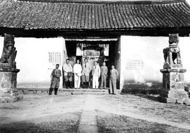 中文（中国大陆）: 1935年4月凌纯声、勇士衡前往芒市调查，与芒市头面人物合影，左三为方克光，右一为方克胜